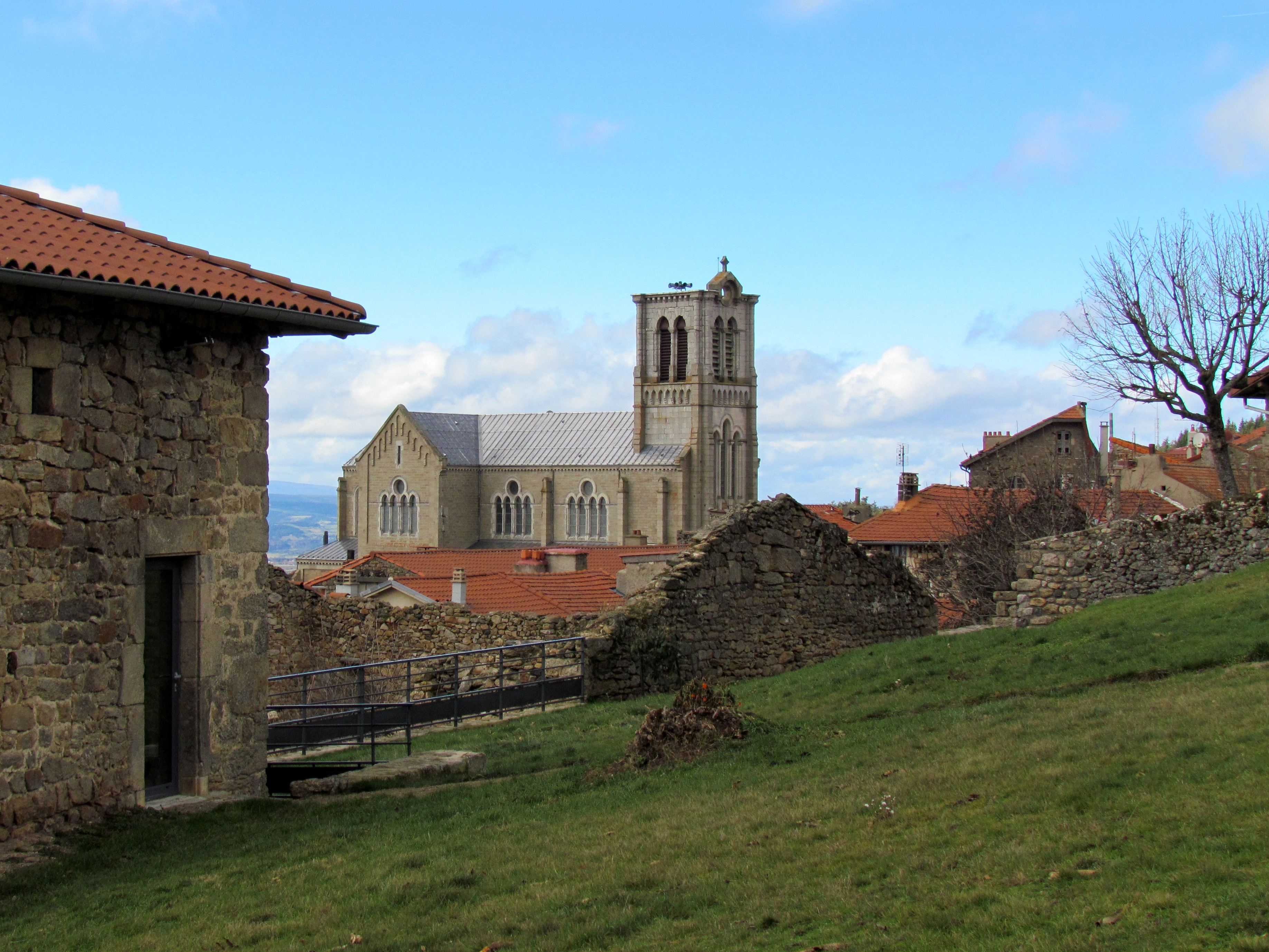 Vue sur l'église de Pradelles # Haute-Loire (43) .